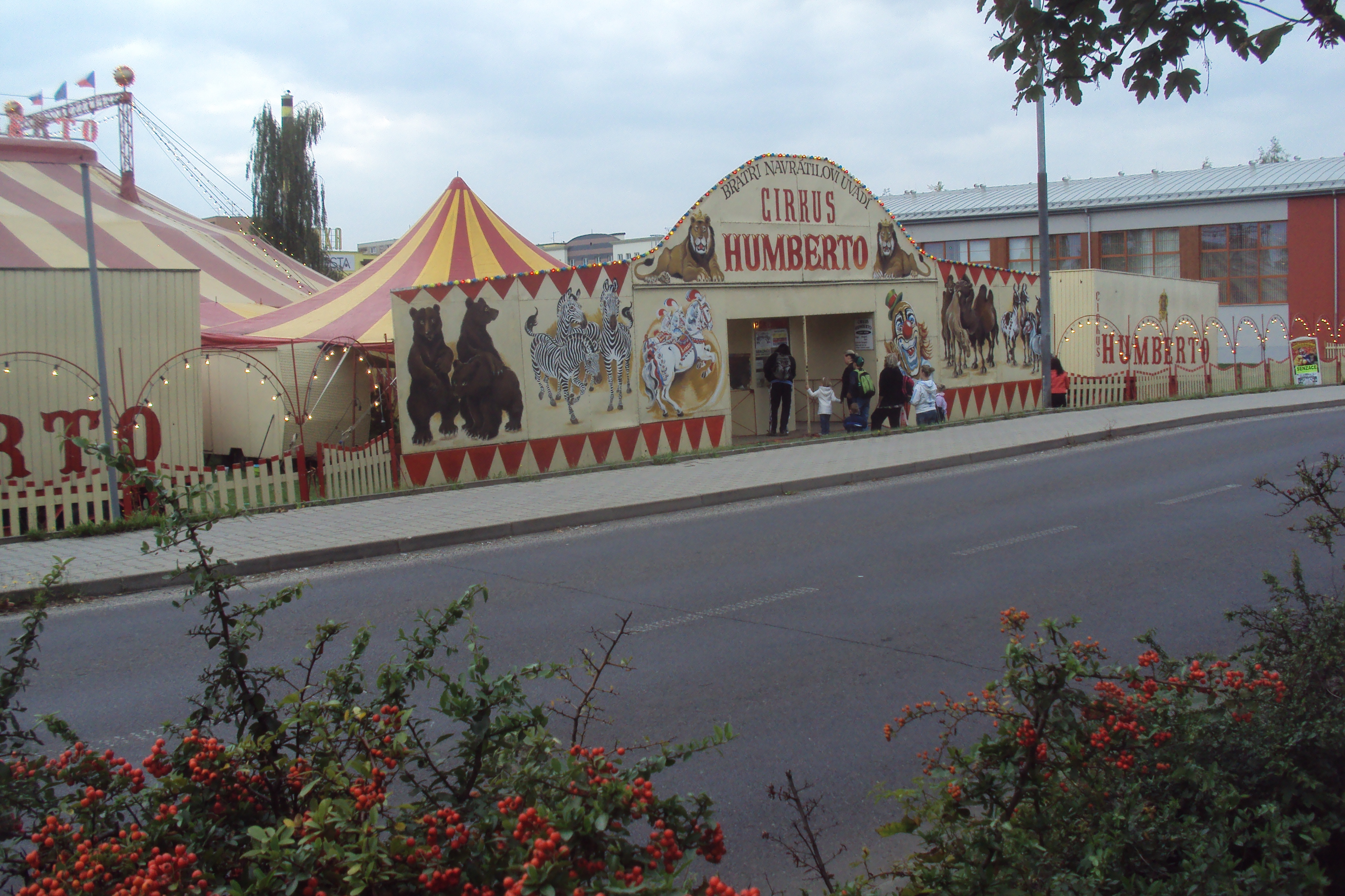 Český cirkus Humberto v České Lípě